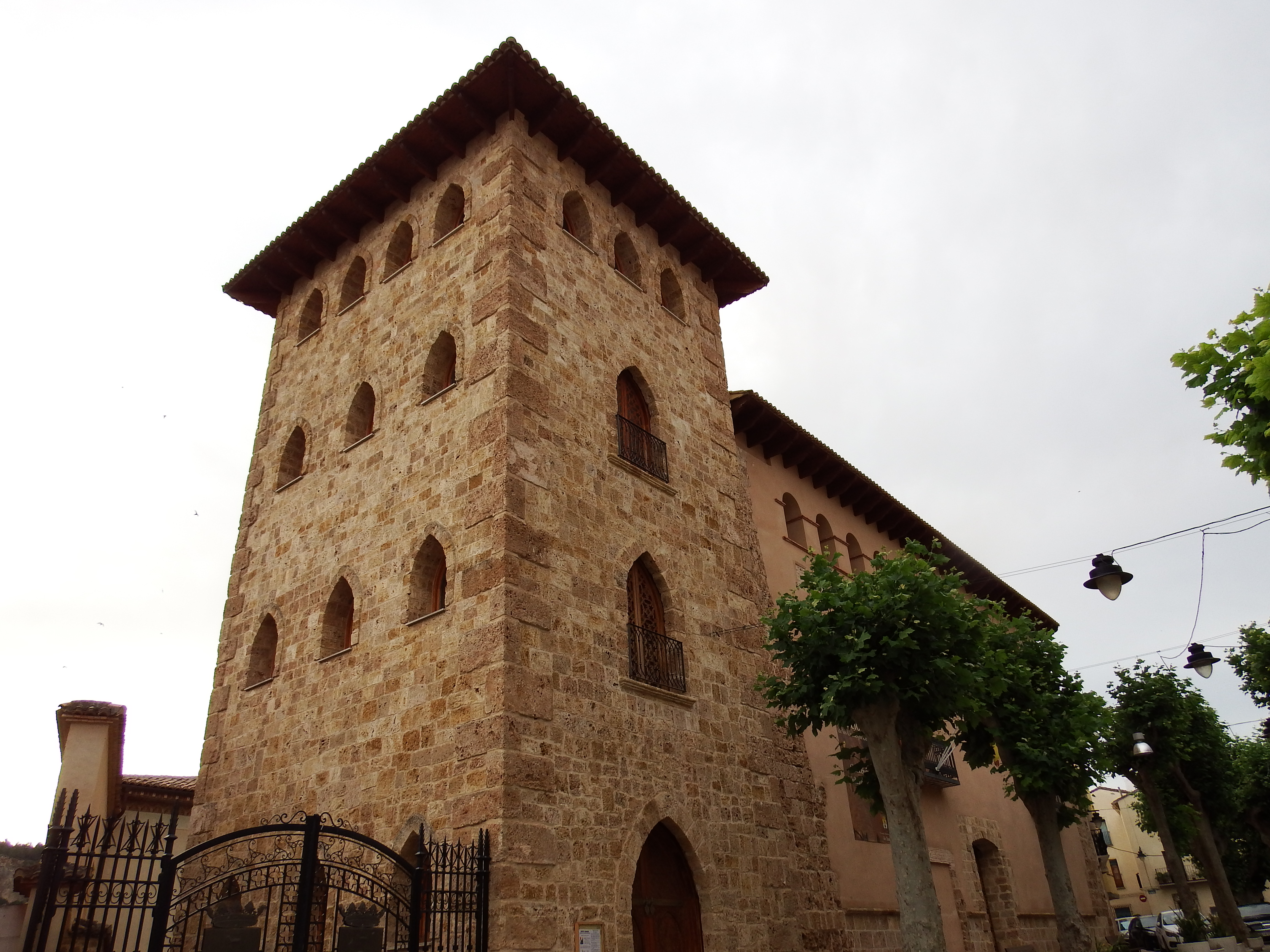 Imágenes de Anna, La Canal de Navarrés